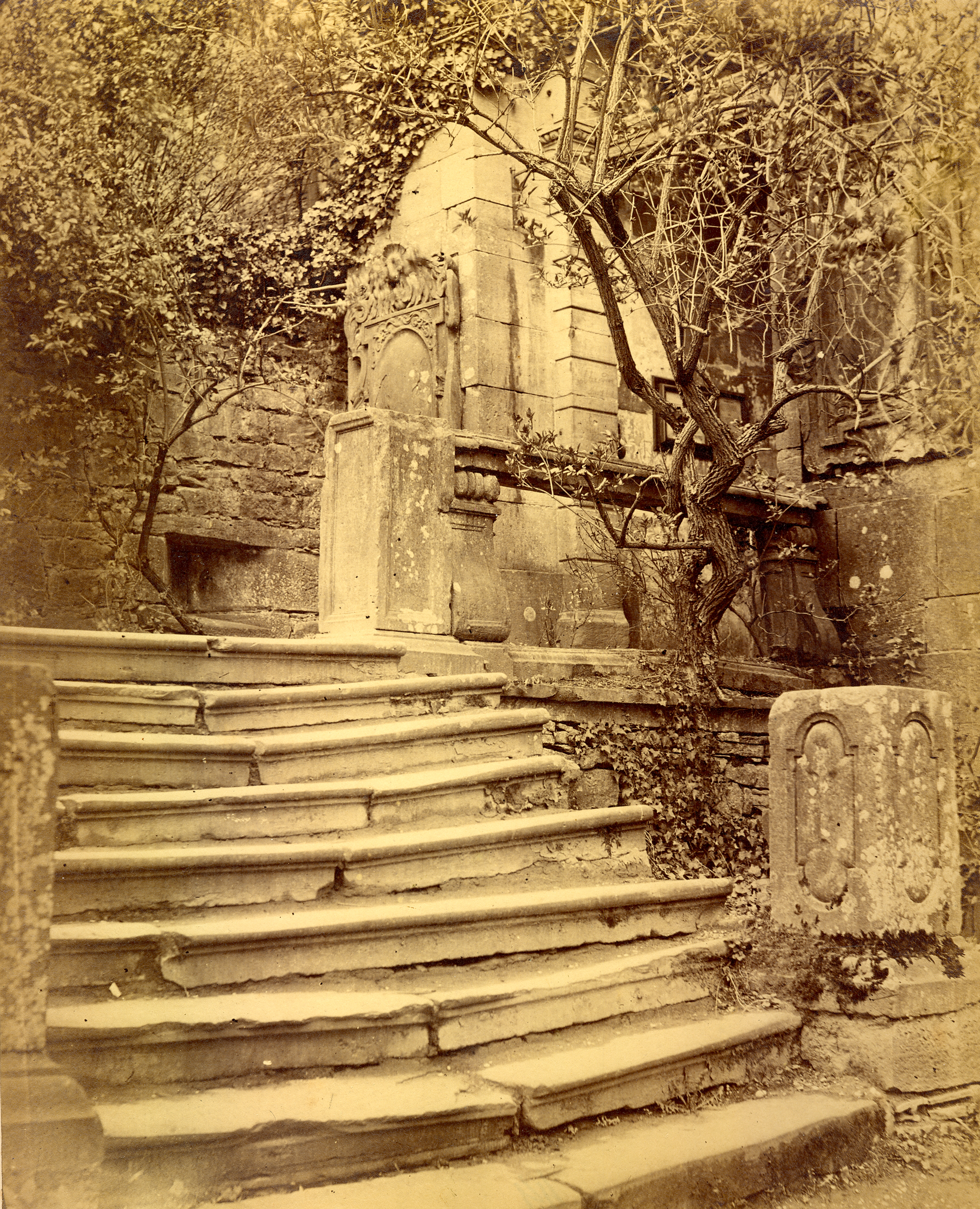 Treppe